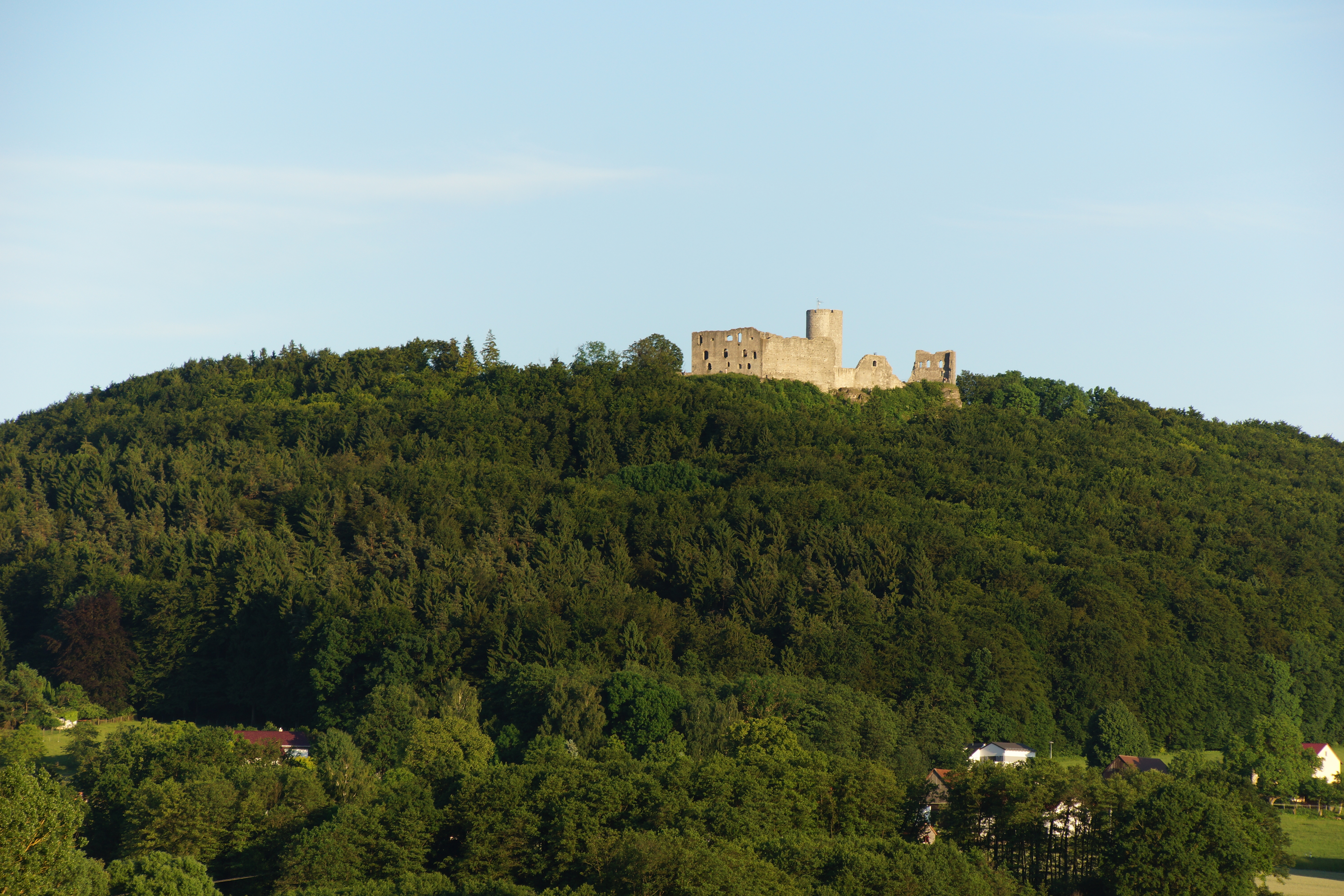 Der Berg Wolfstein bei Neumarkt in der Oberpfalz